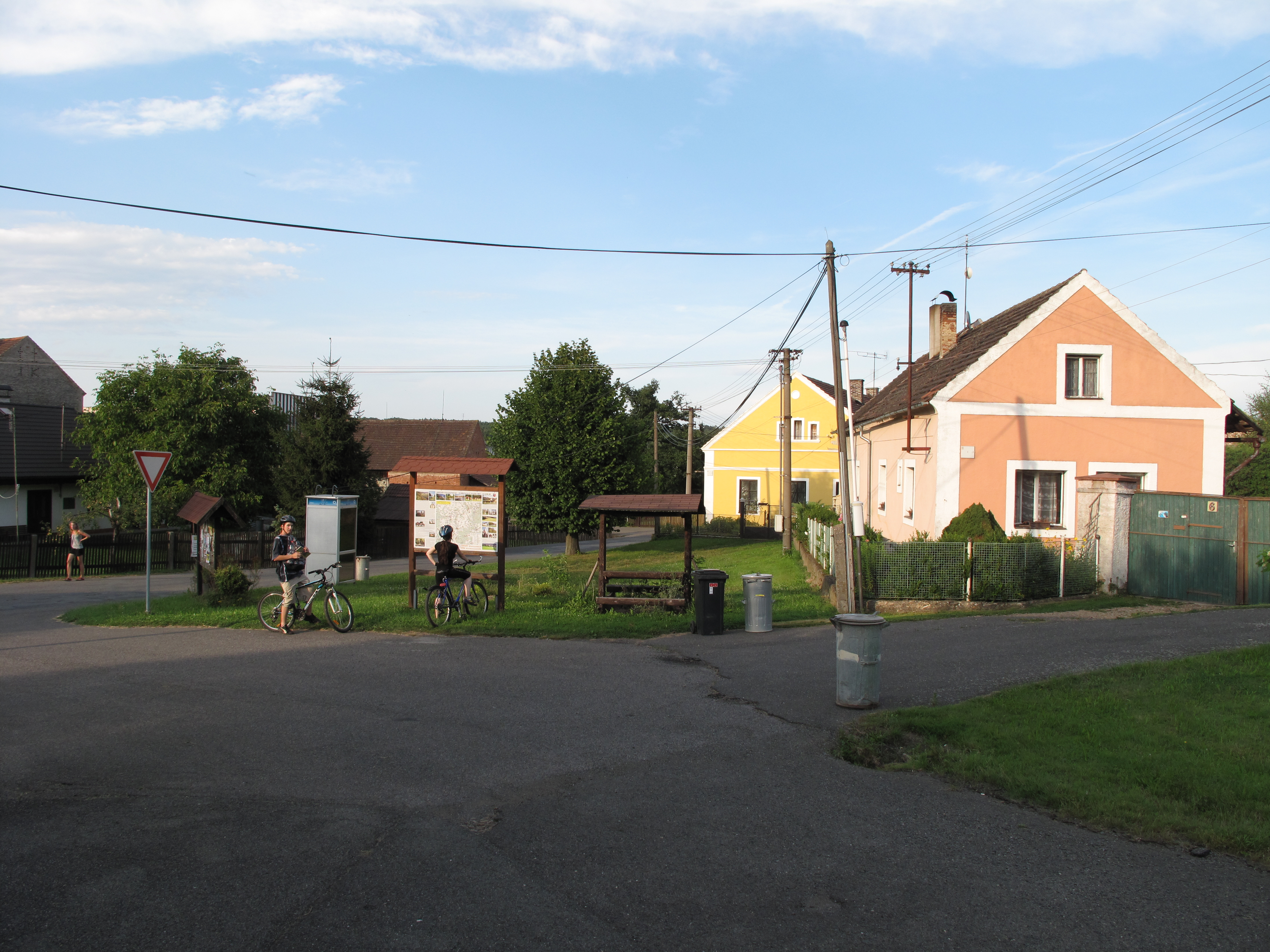 Náves v Kladrubech. Okres Rokycany, Česká republika.